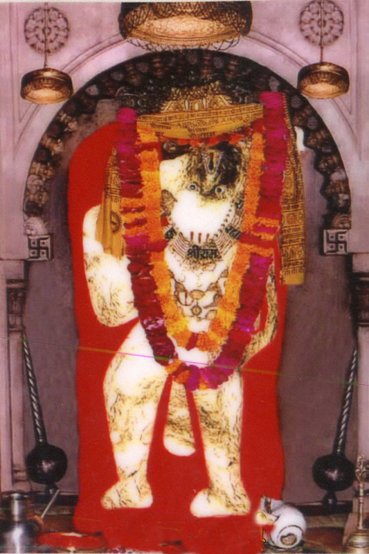 महेन्दीपुर बालाजी